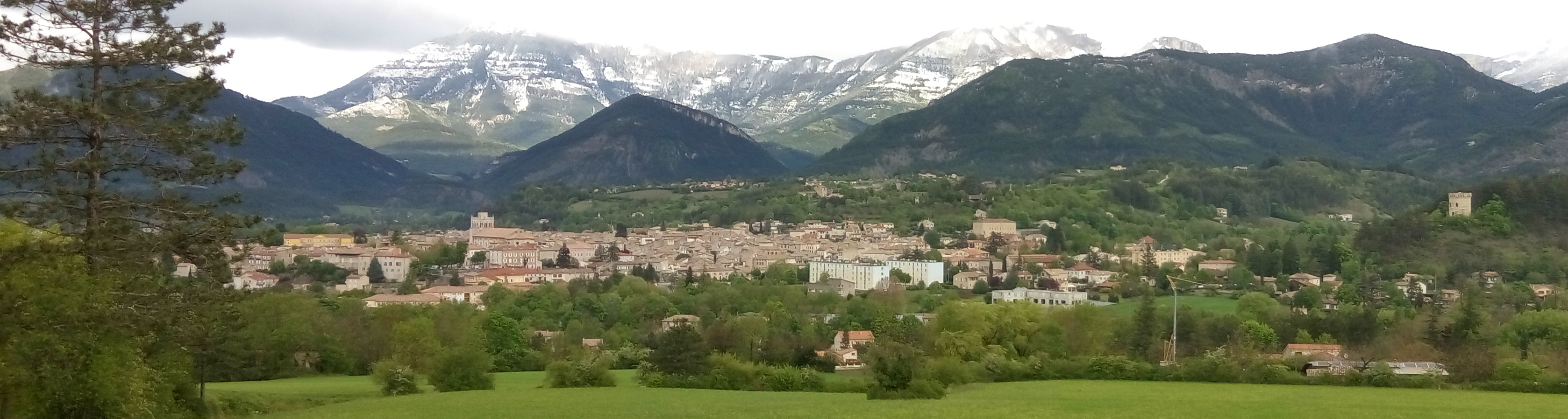 Vue sur la ville de Die dans la Drôme.